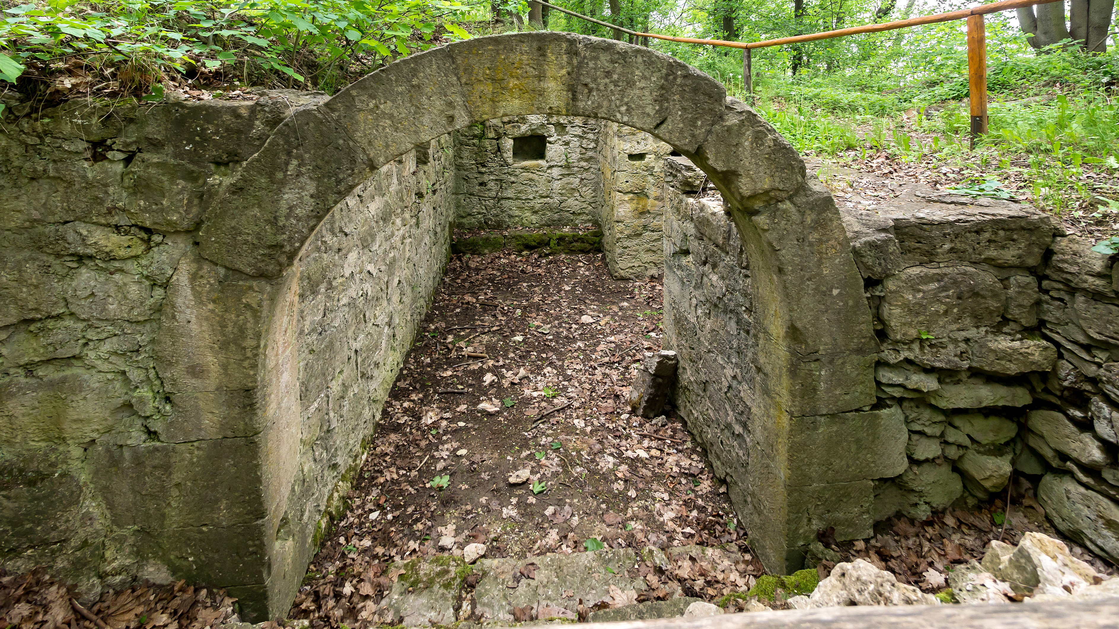 Burg Wintberg mittelalterliche Burganlage , Wenigenjena/Ziegenhain IV